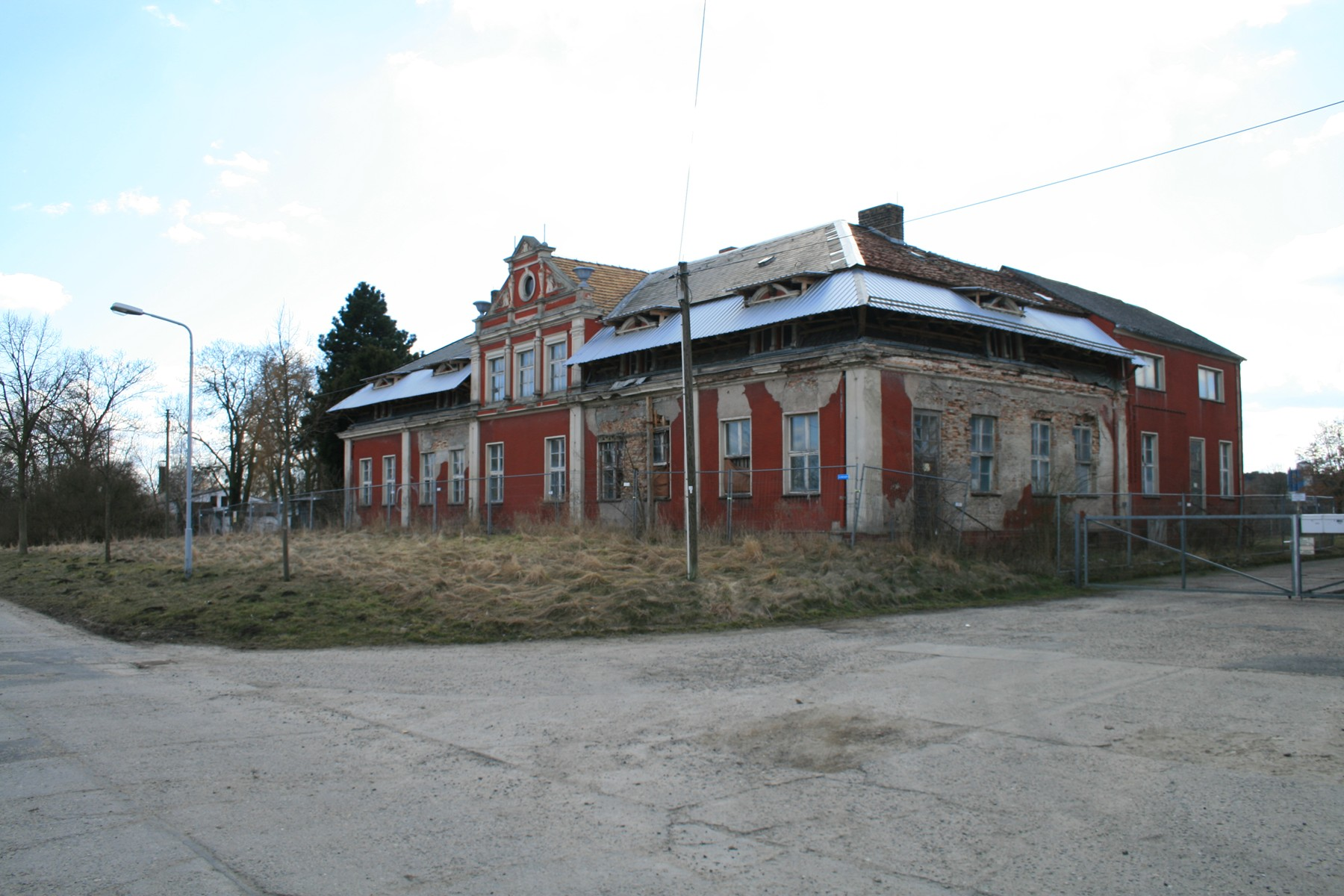 Potsdam OT Satzkorn, Dorfstraße 7-11. Rittergut mit Gutshaus, Verwalterhaus, zwei Stallgebäuden, zwei Schafställen. Baudenkmal